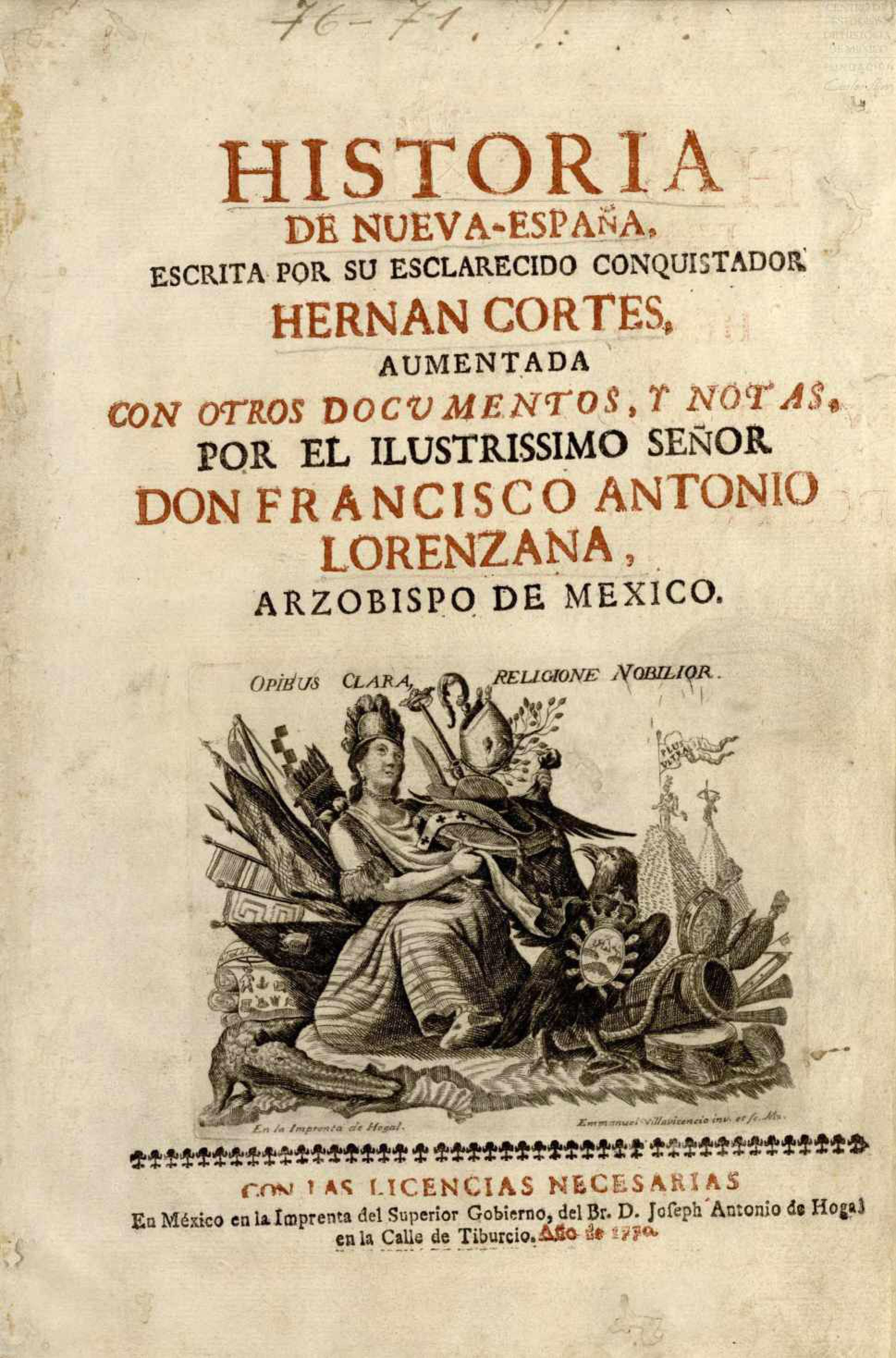 Hernán Cortés, Francisco Antonio Lovenzana, escrita por su esclarecido conquistador Hernán Cortés